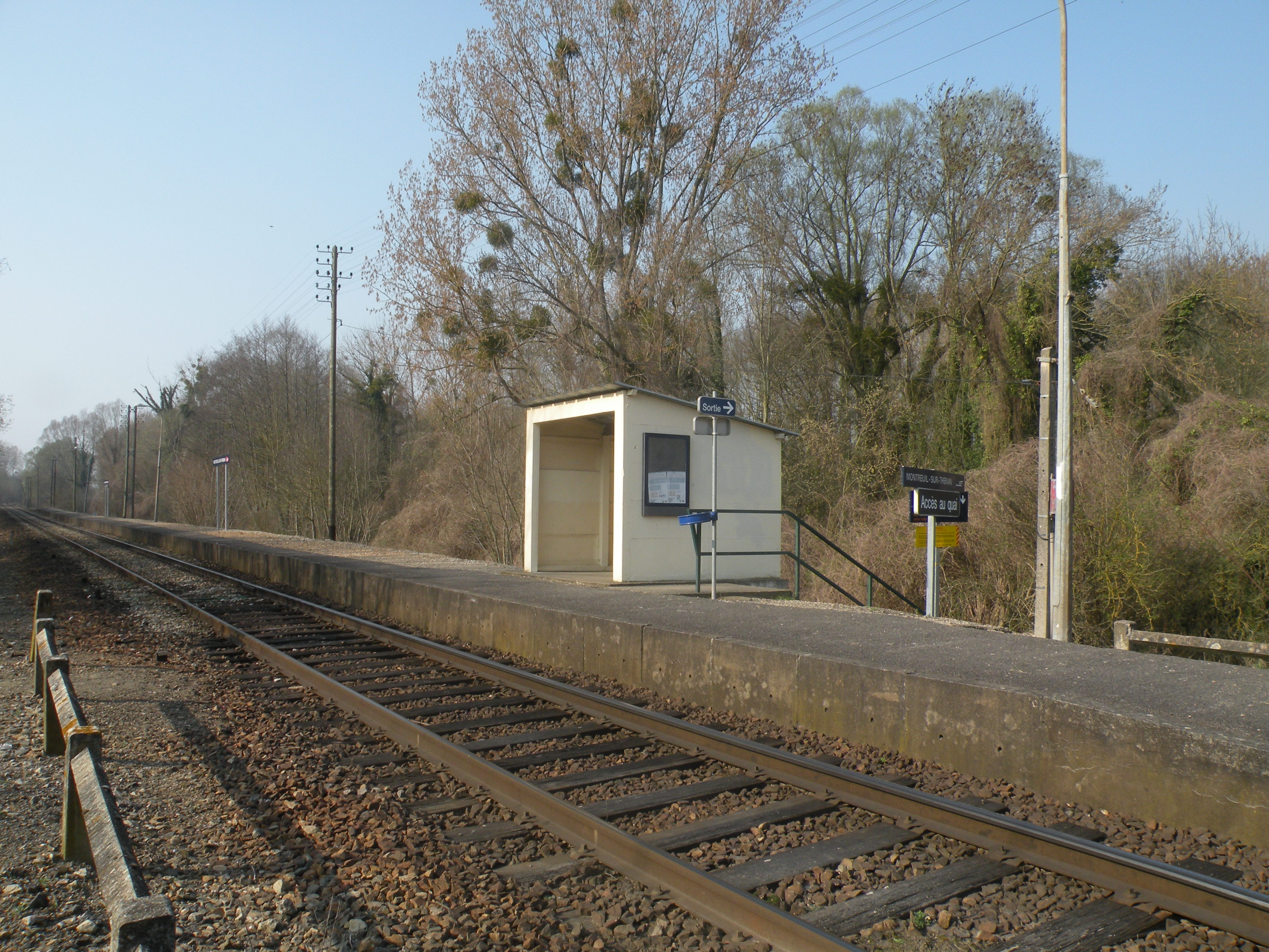 quai de la gare de Montreuil-sur-Thérain